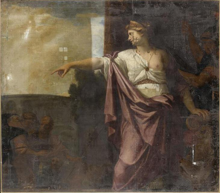 "Reine s'adressant à des soldats", ou "la reine de Saba appuyée sur son trône", Nicolas Loir, musée du Louvre, n°8715.